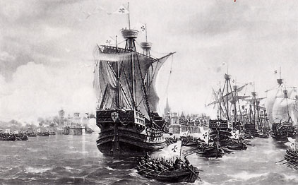 Flotte des Deutschen Ordens